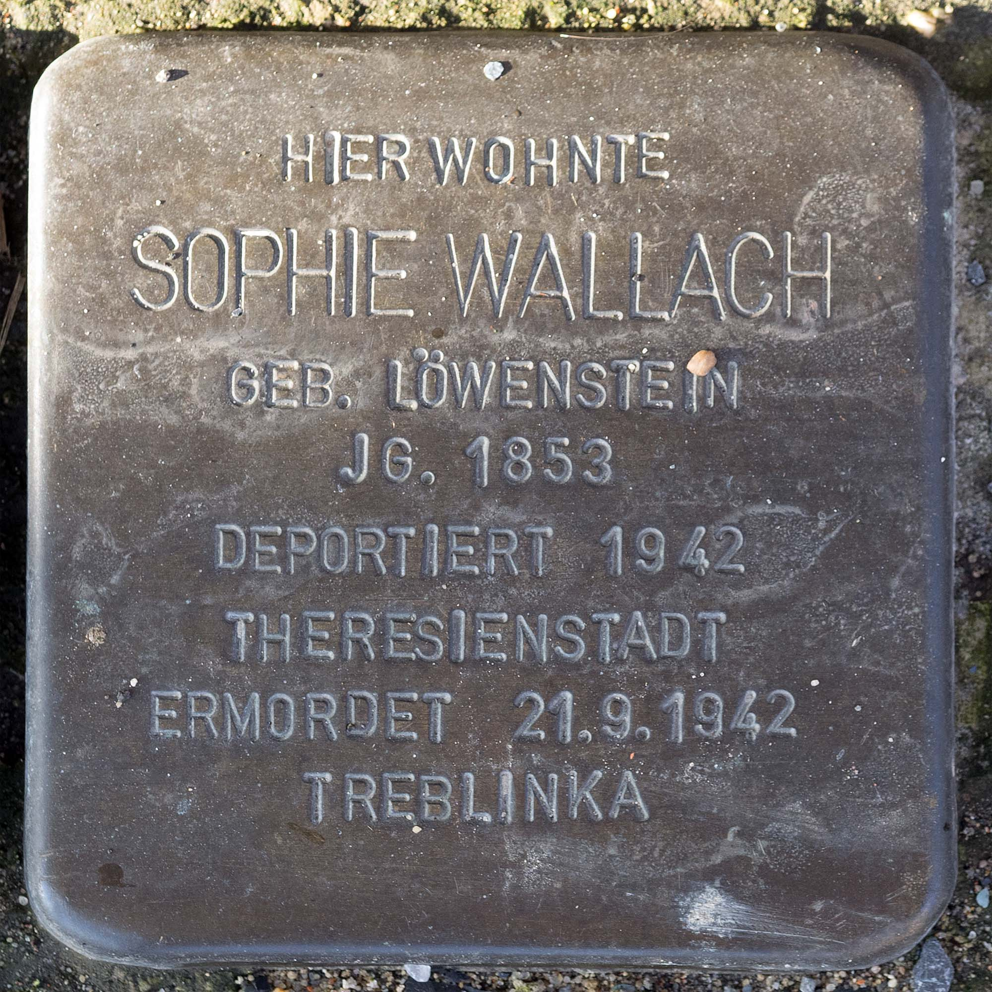 Stolperstein für Wallach Sophie